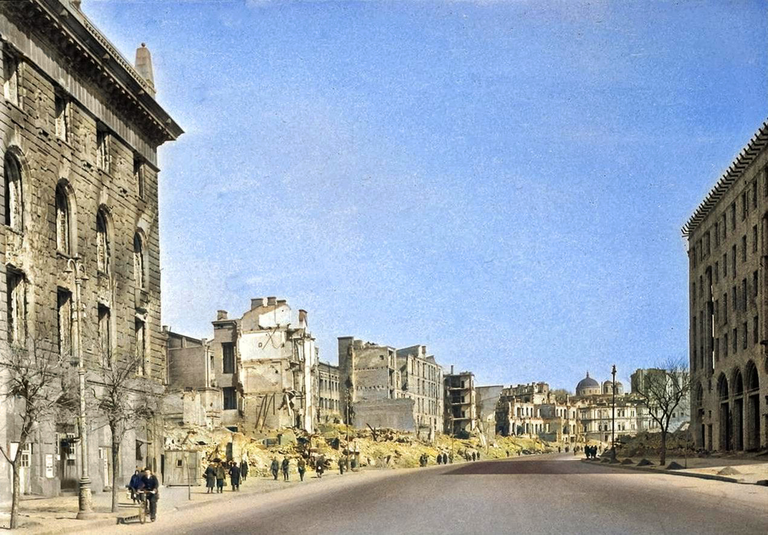 Хрещатик після підриву радянськими диверсантами